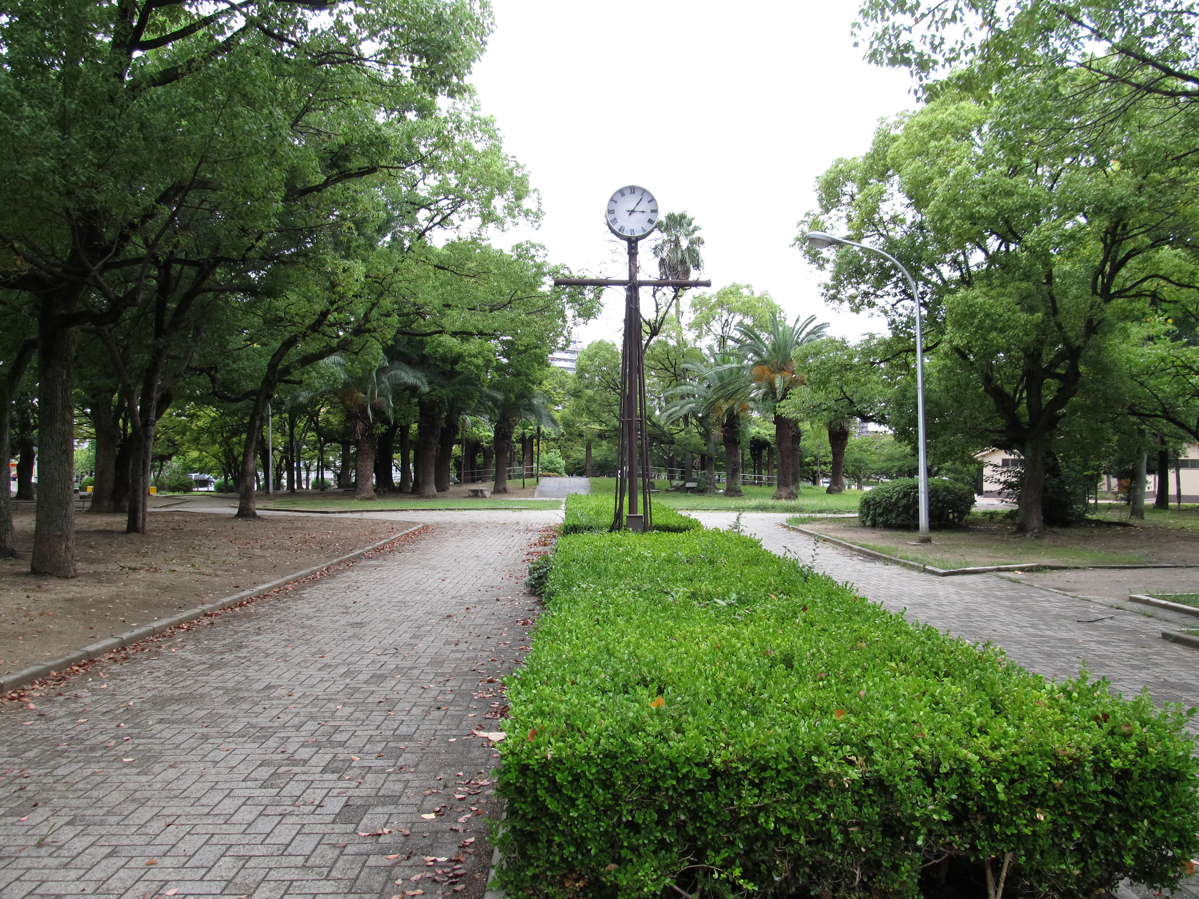 大阪府堺市堺区にある戎公園（ザビエル公園）。